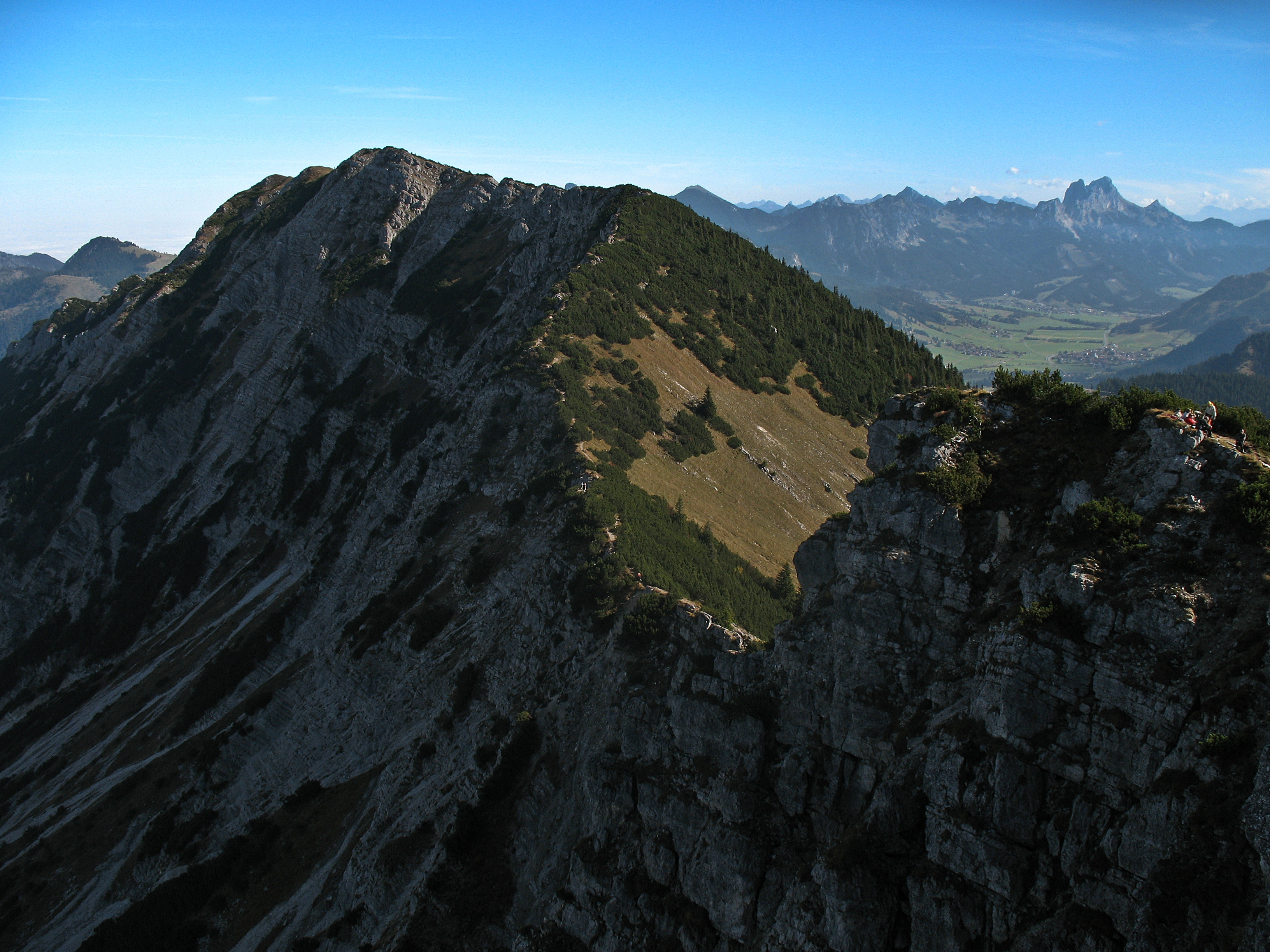 Blick vom Iseler (1876 m) nach Osten über den Verbindungsgrat zum Kühgundkopf (1907 m) und rechts davon das Tannheimer Tal und dahinter die Tannheimer Berge.